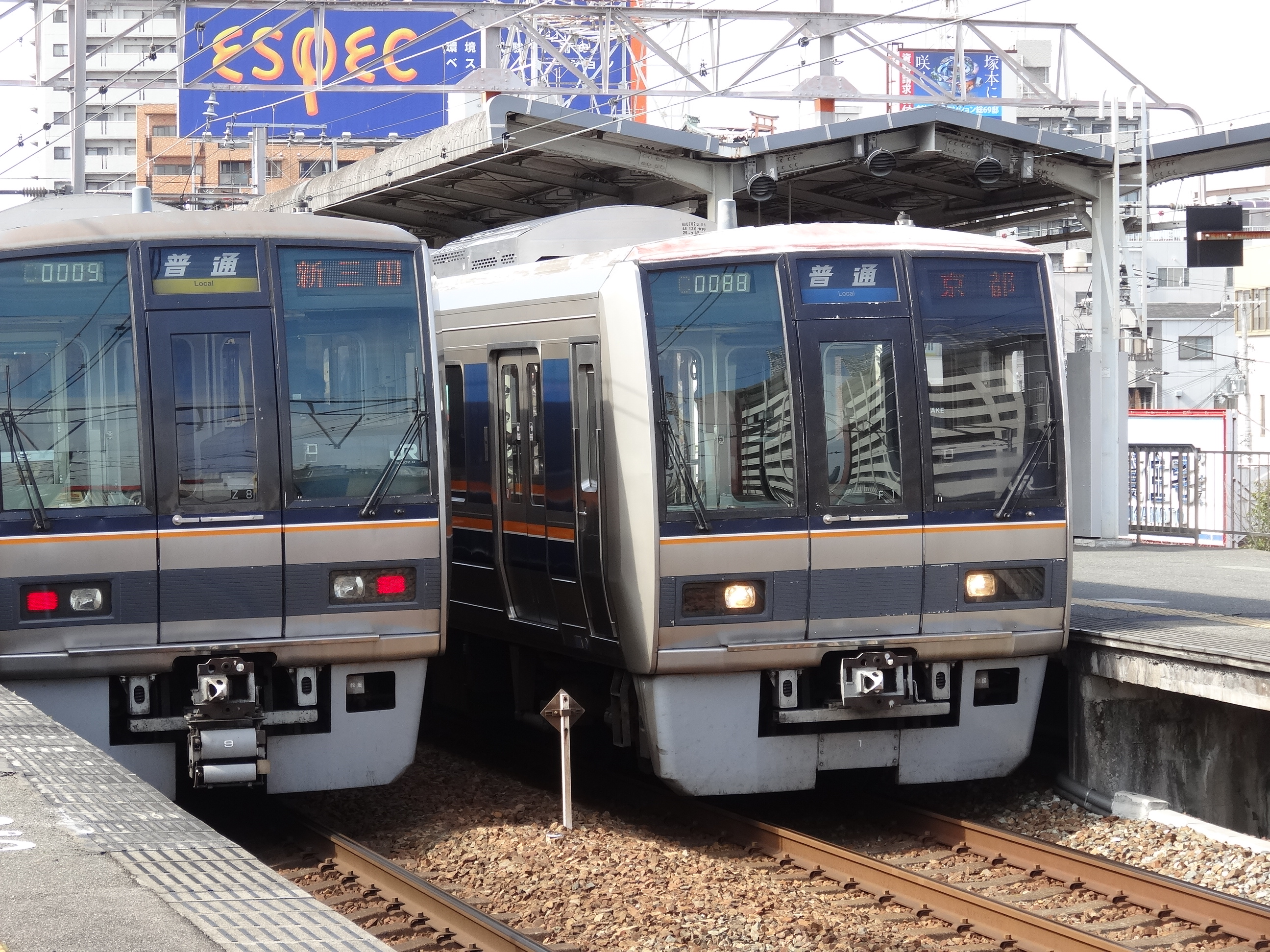 右が量産車左が試作車。 連結器を見ると試作車は電動連結器ではないことが分かる。